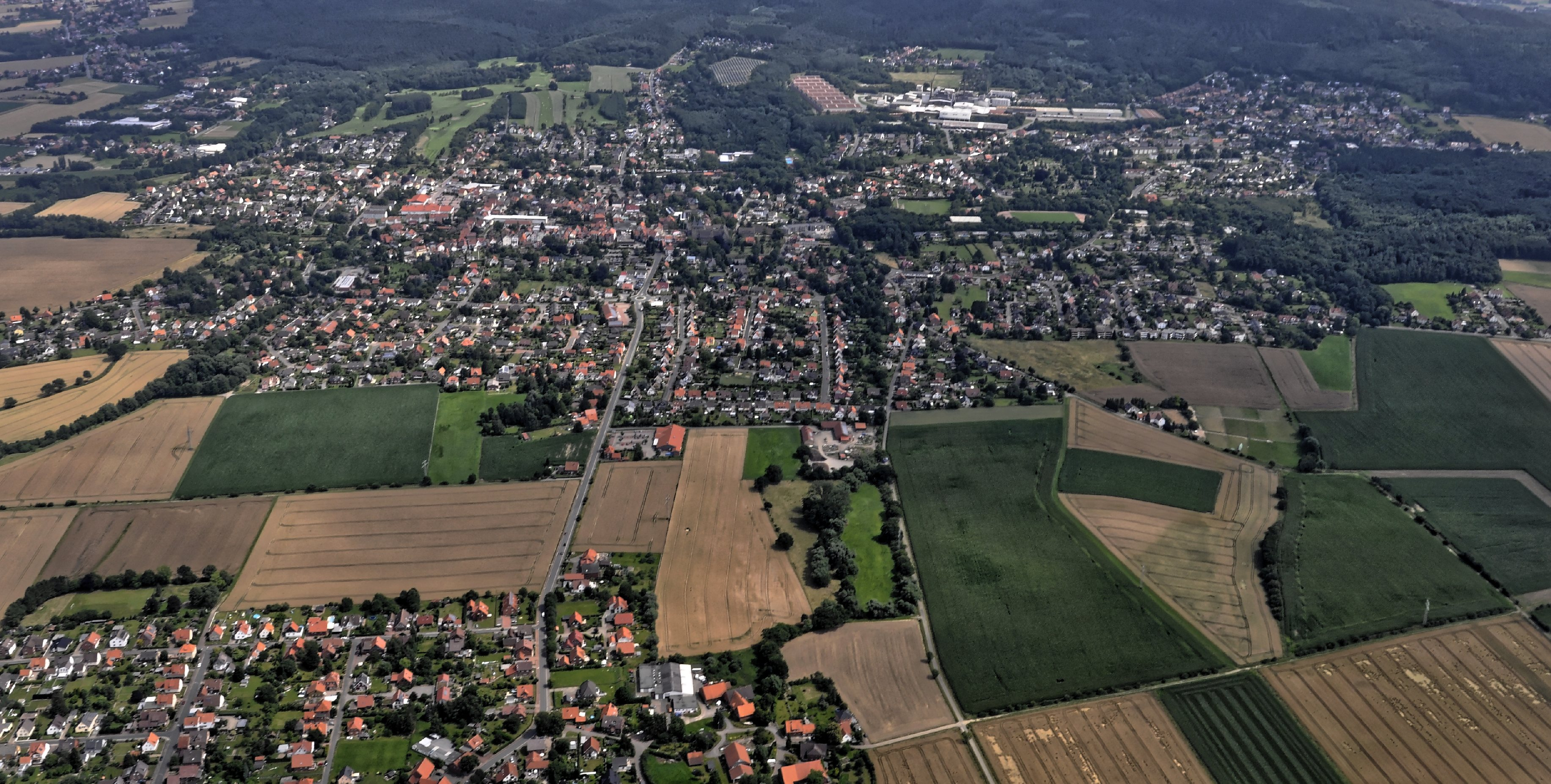 Bilder vom Flug Nordholz-Hammelburg 2015: Obernkirchen